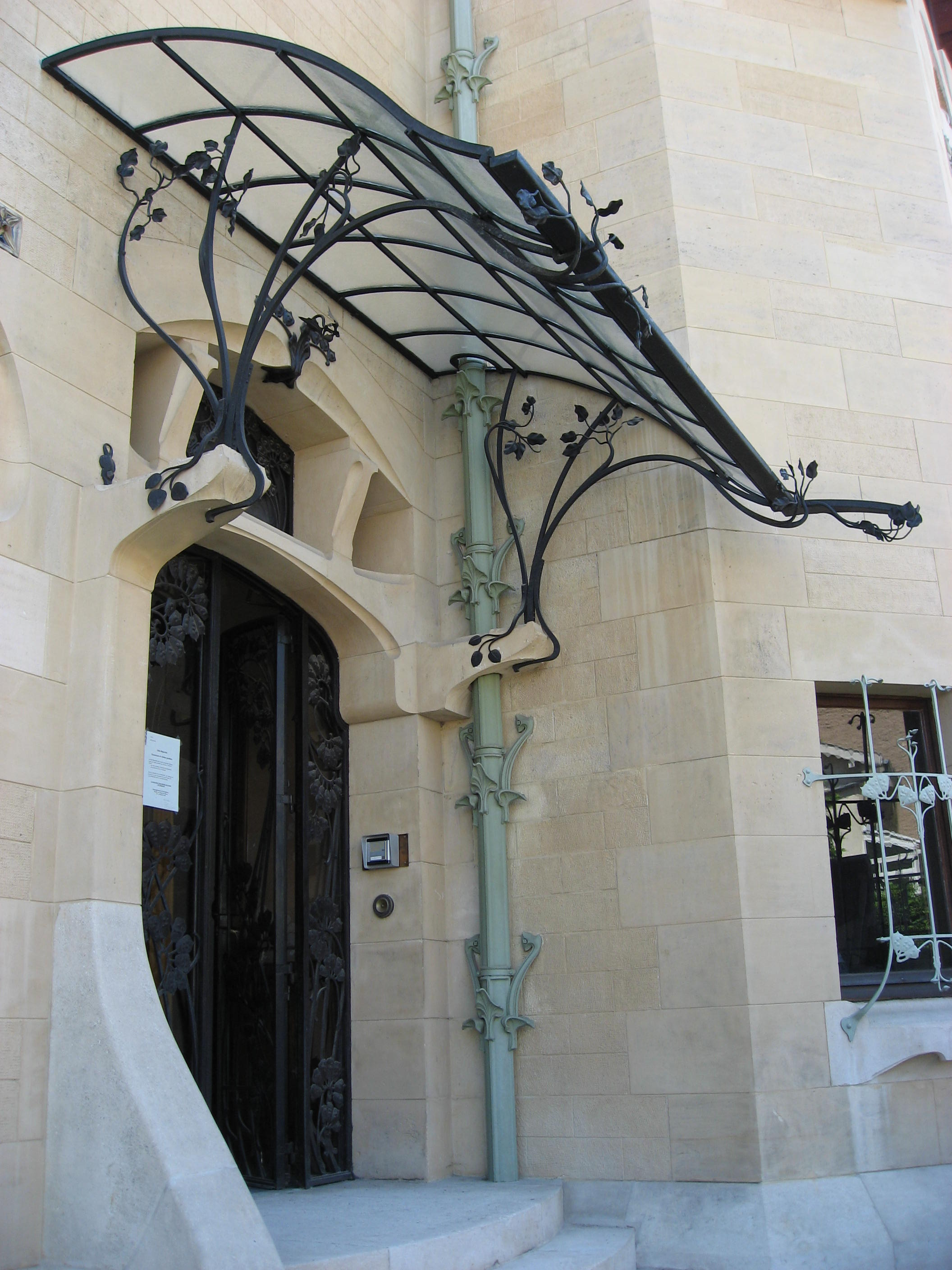 Villa Jika pour Louis Majorelle 1901-1902 1, rue Louis Majorelle 54000 Nancy Architecte: Henri Sauvage Vitraux: Jacques Grüber Ferronneries: Louis Majorelle Grès flammés: Alexandre Bigot Map: 48° 41' 8" N 6° 9' 50" E